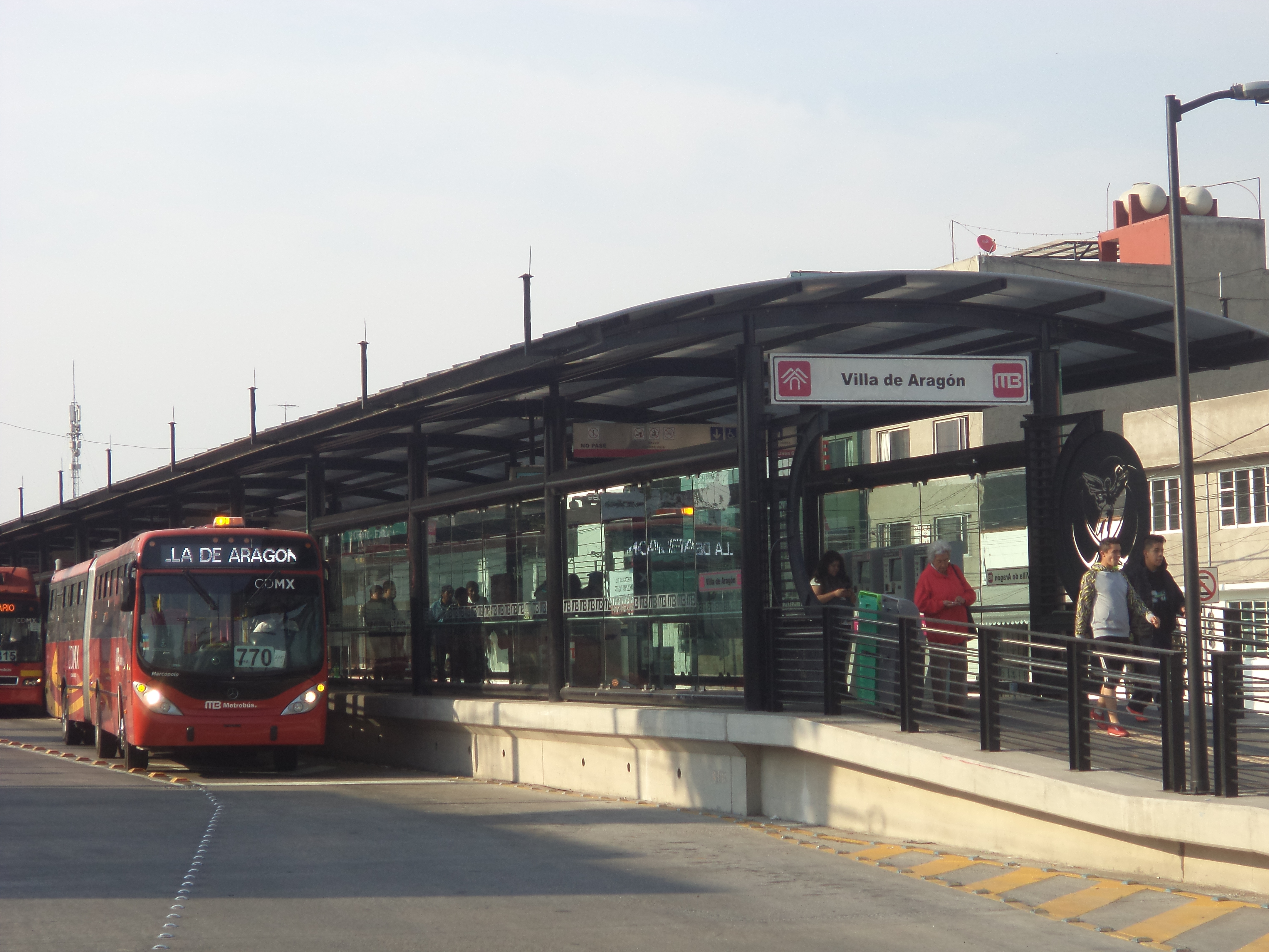 Terminal Villa de Aragón Línea 6